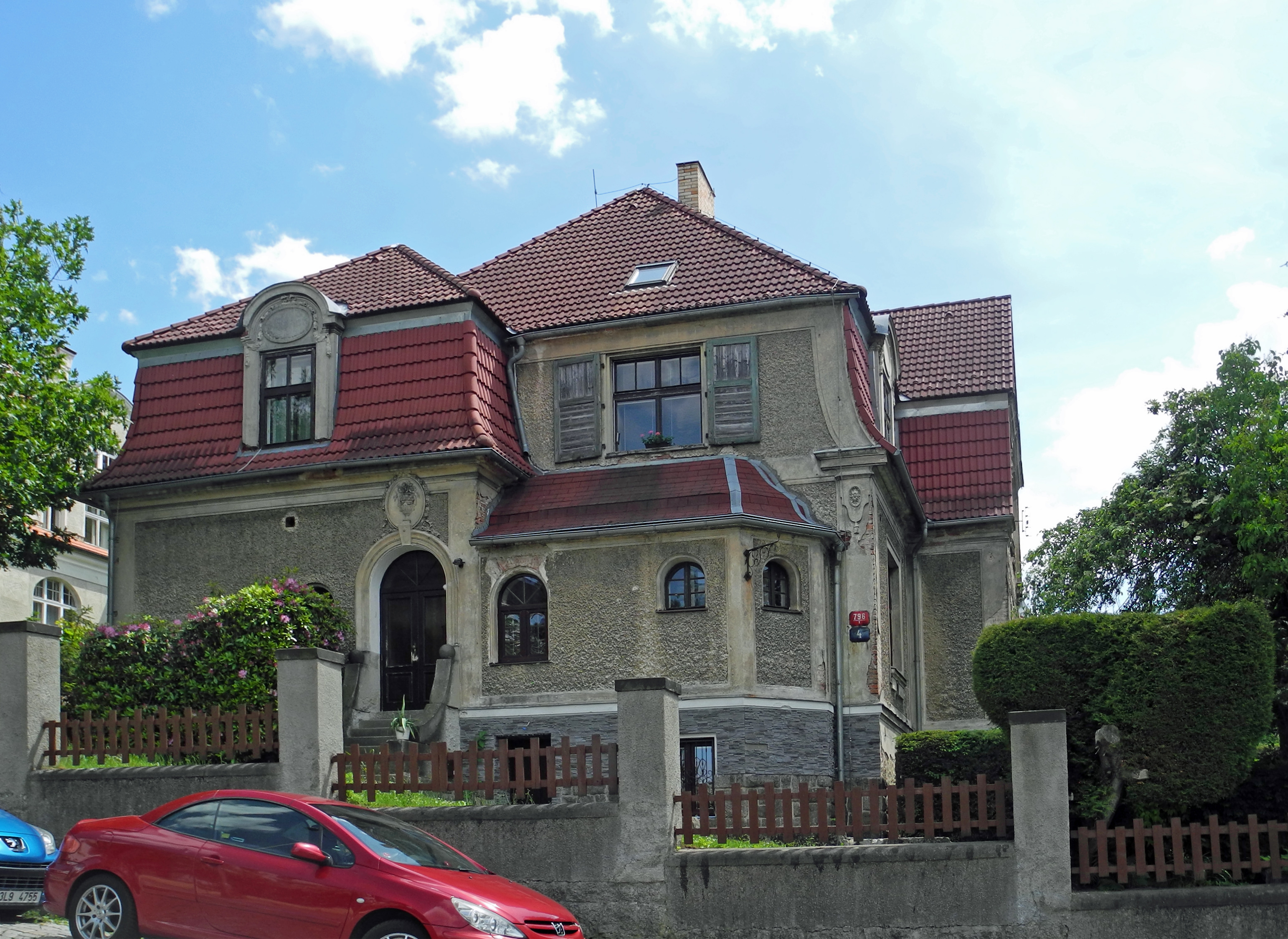 Ehem. Villa Max Kühn in Reichenberg – Liberec, Vrbova 796/4; Architekt: Max Kühn (1907/08)